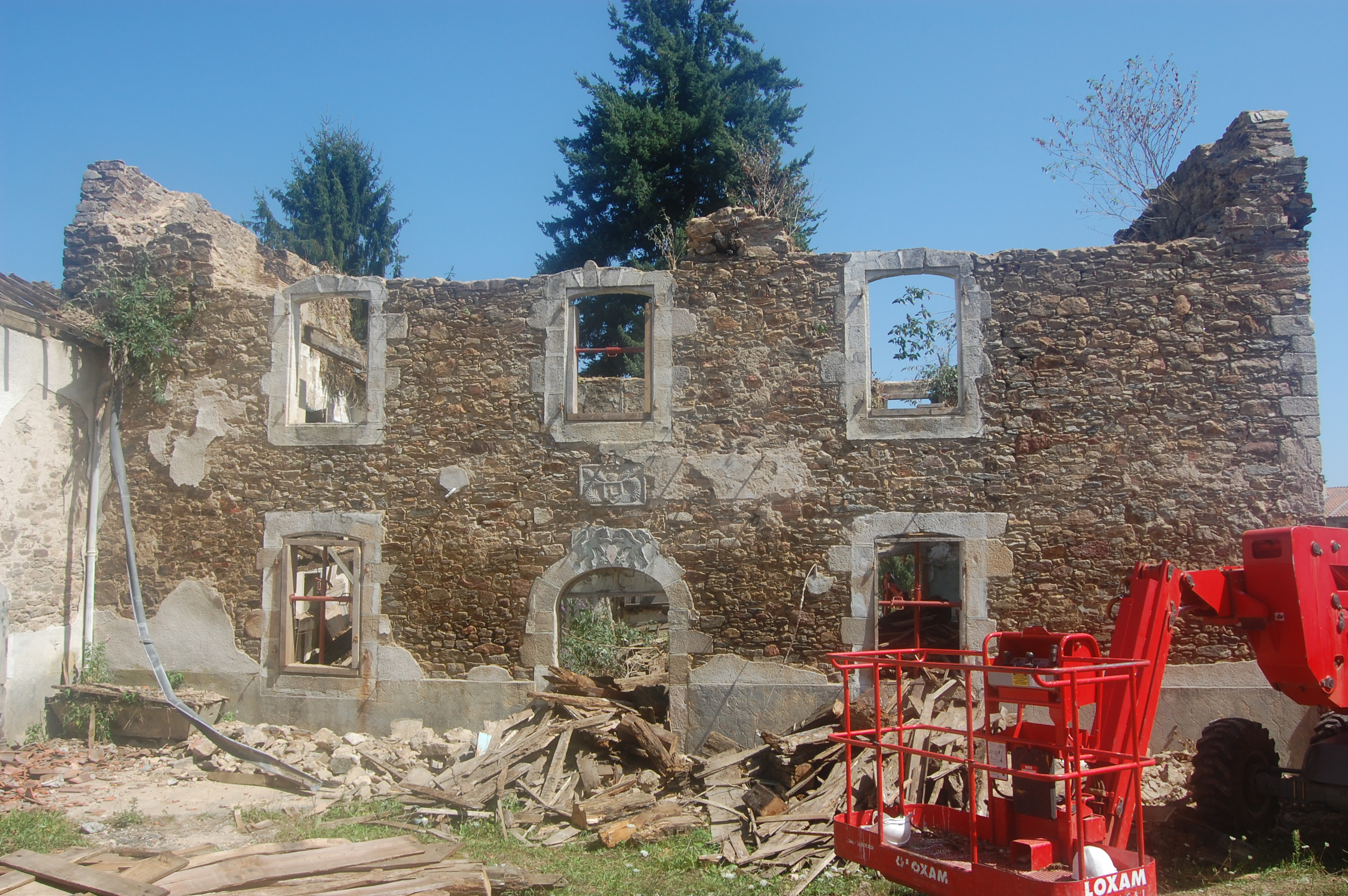 Châlus réhabilitation de "L'Auberge limousine"